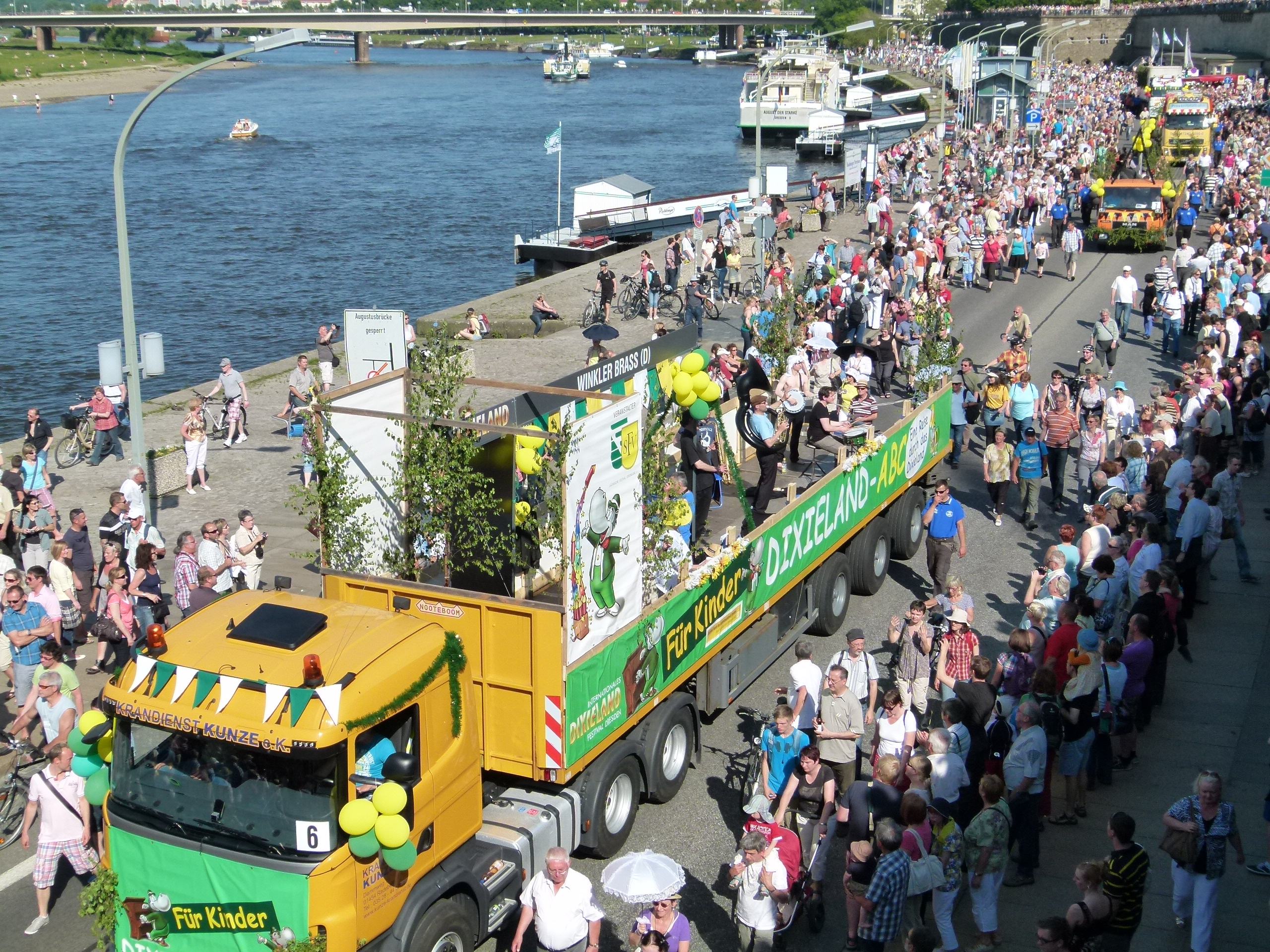 Abschlußparade des 42. Internationalen Dixieland-Festivals am Elbufer in Dresden, Sachsen